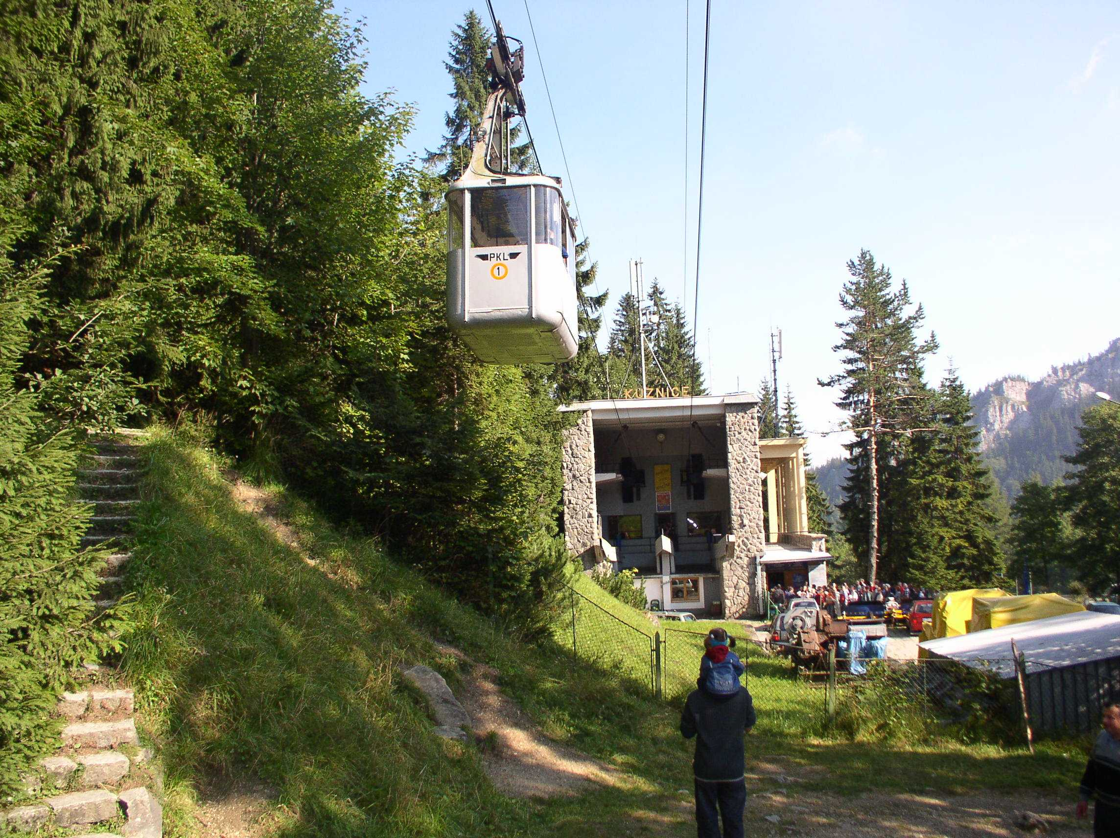 Kolejka linowa na Kasprowy Wierch - Kuźnice